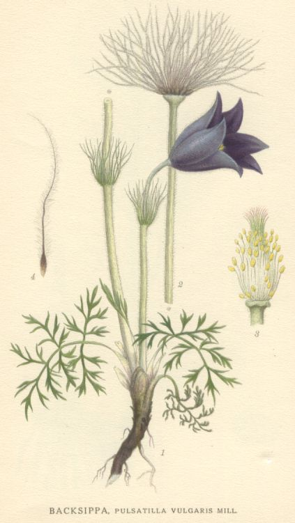 Pulsatilla vulgaris